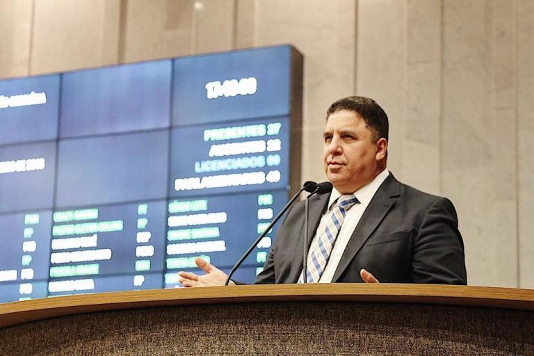 Pastor Cleiton Collins - Deputado Estadual